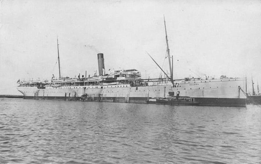 SS Galeka